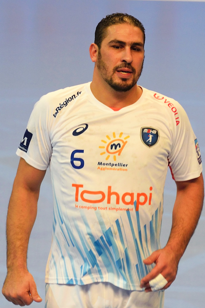 Issam Tej, pivot du club Montpellier Agglomération Handball, le 3 décembre 2014 lors du match face au PSG Handball.